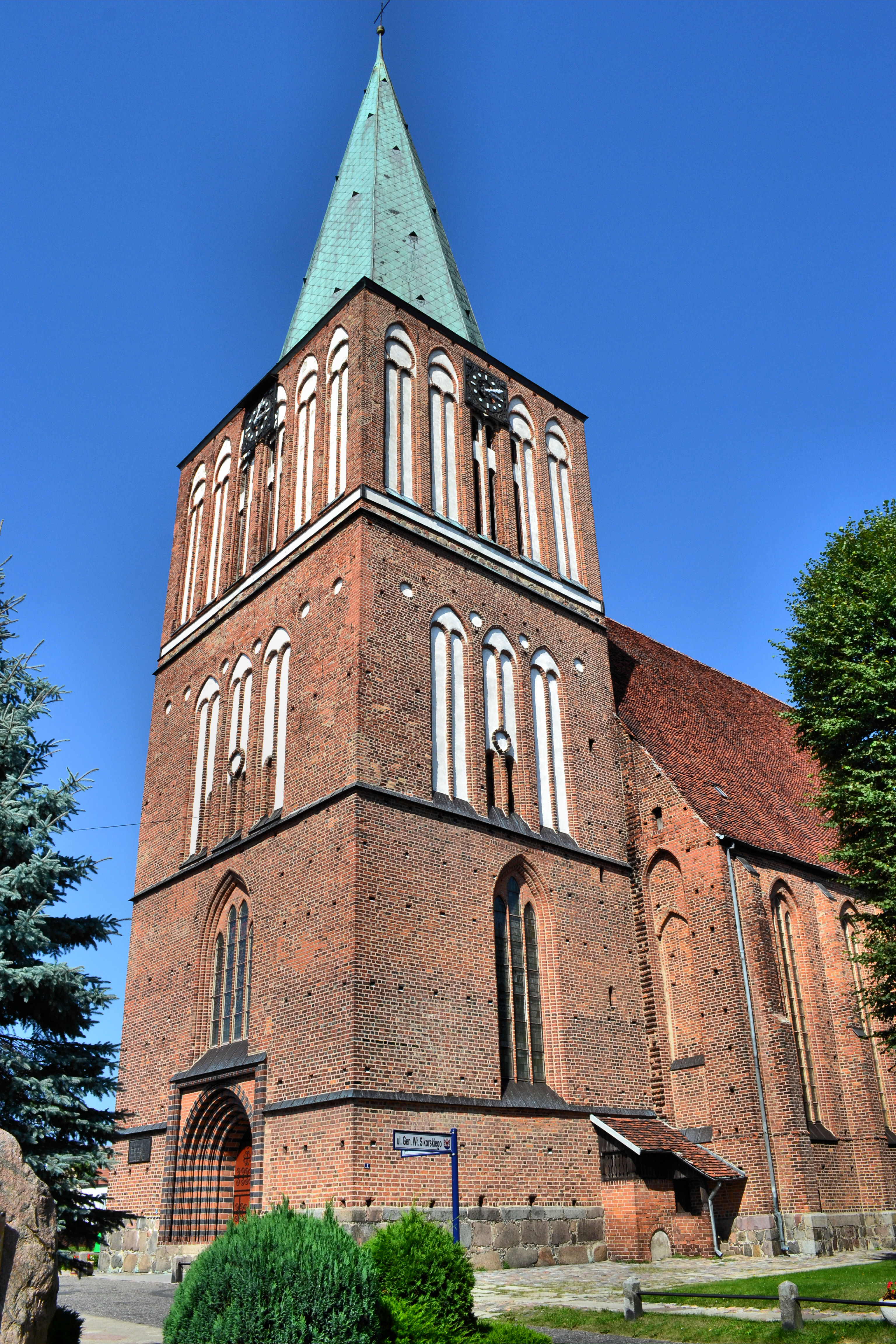 Kościół Zmartwychwstania w Drawsku Pomorskim